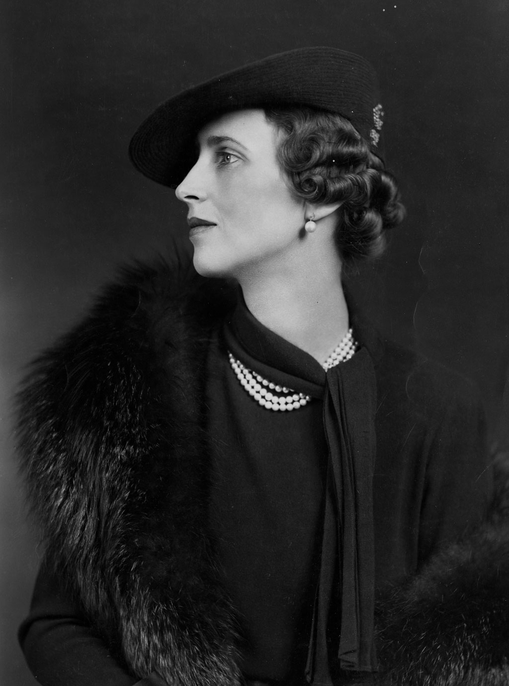 Српски (ћирилица): Књегиња Олга Карађорђевић